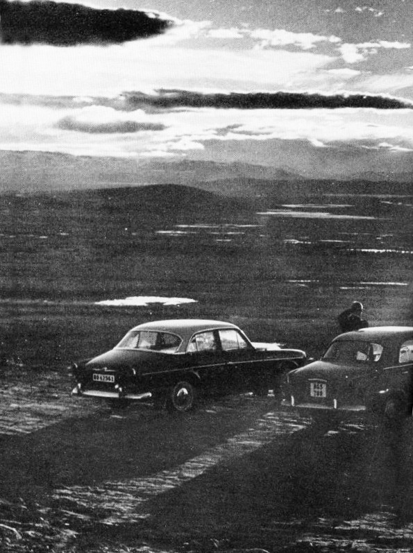 Midnattssolsrallyt, Lappland 1965